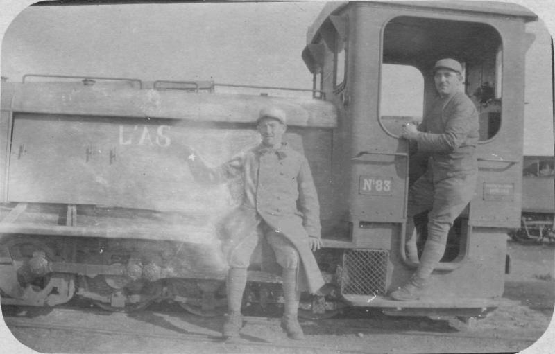 locotracteur de marque Schneider type LG ou LG 3 employé par l'artillerie pour la traction des trains sur la voie de 0,60 m. Ces matériels sont apparus sur le front qu'à partir de 1916 et surtout de 1917.